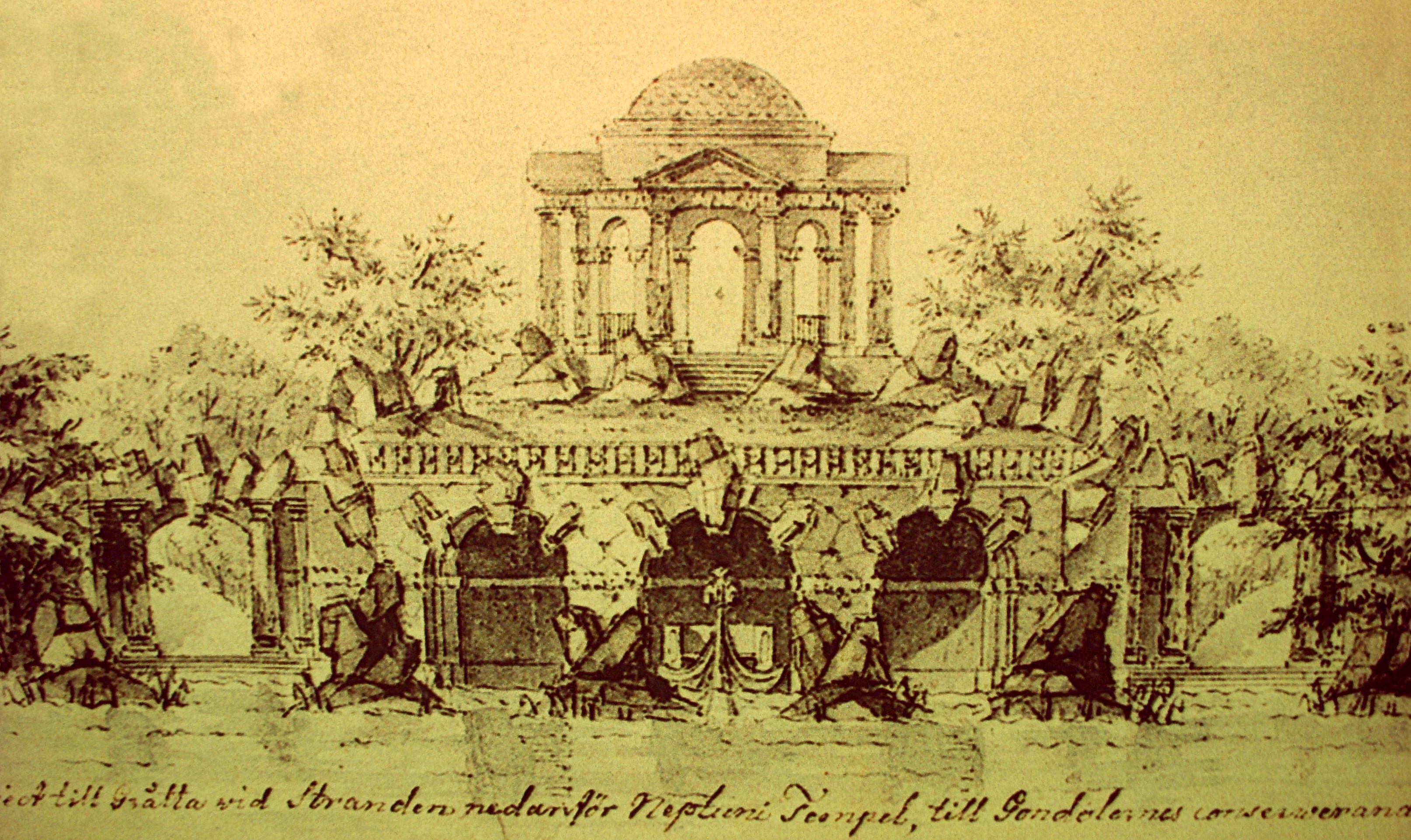 Grotta för Hagaparkens gondoler och Neptuni tempel (planerat)